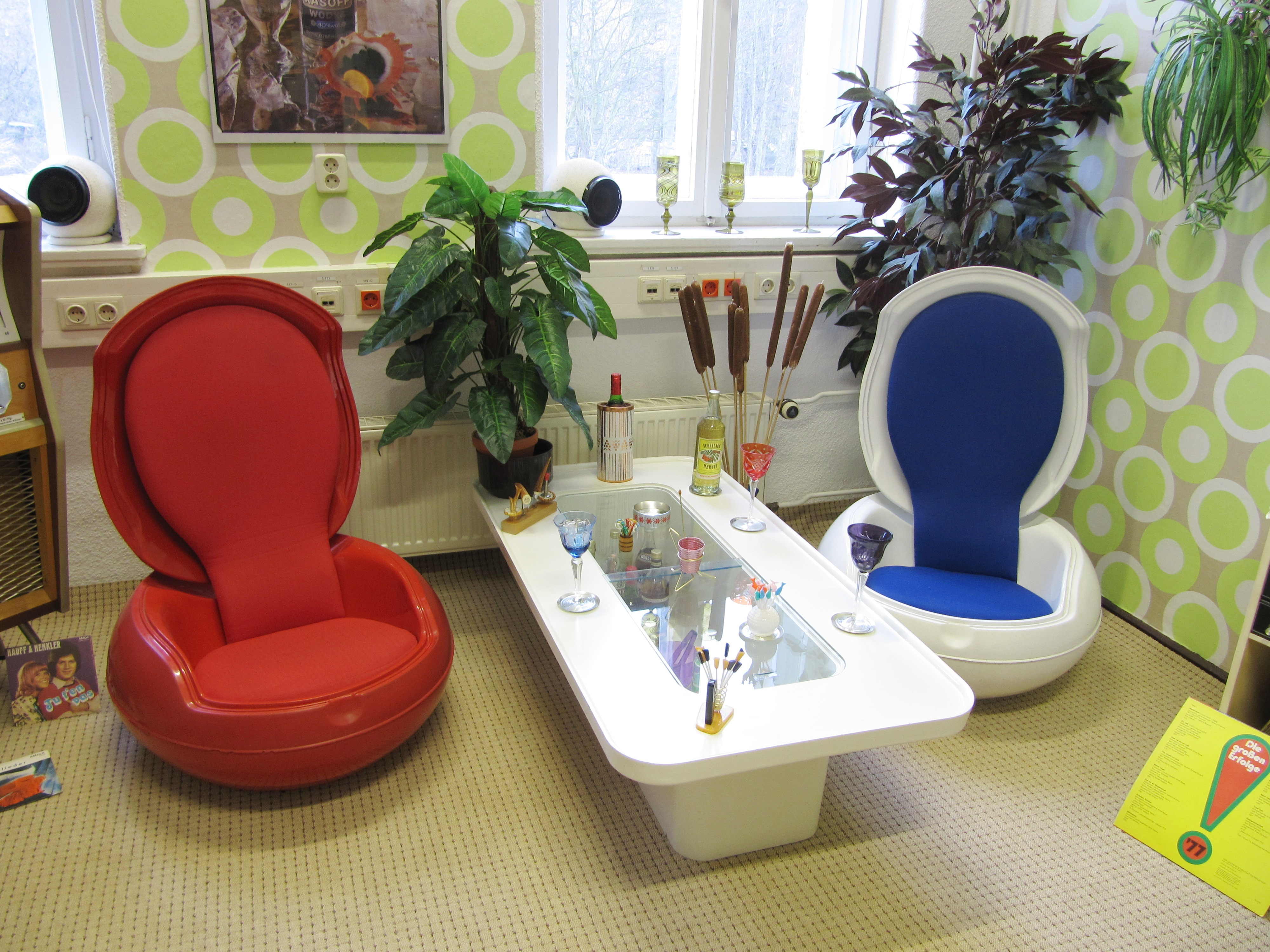 Das Senftenberger Ei und weitere Gegenstände aus Kunststoff im DDR-Museum Pirna.